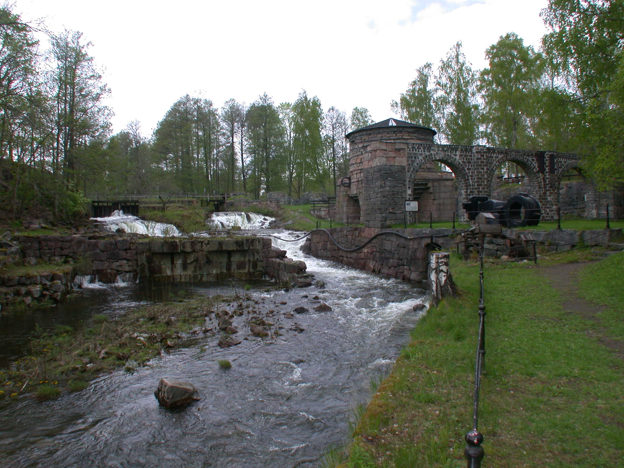 Borgvik iron works, Grums, Sweden. Photo by Riggwelter, May 20, 2006.